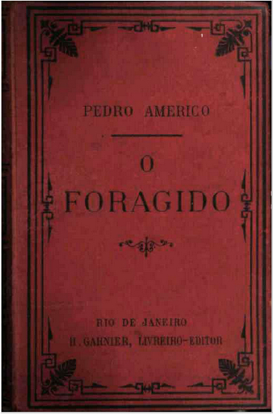 Capa de O Foragido, de Pedro Américo